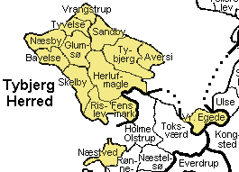 Tybjerg Herred Præstø Amt , Denmark. Map by Svend-Erik Christiansen, edited by user:Nico-dk. new version